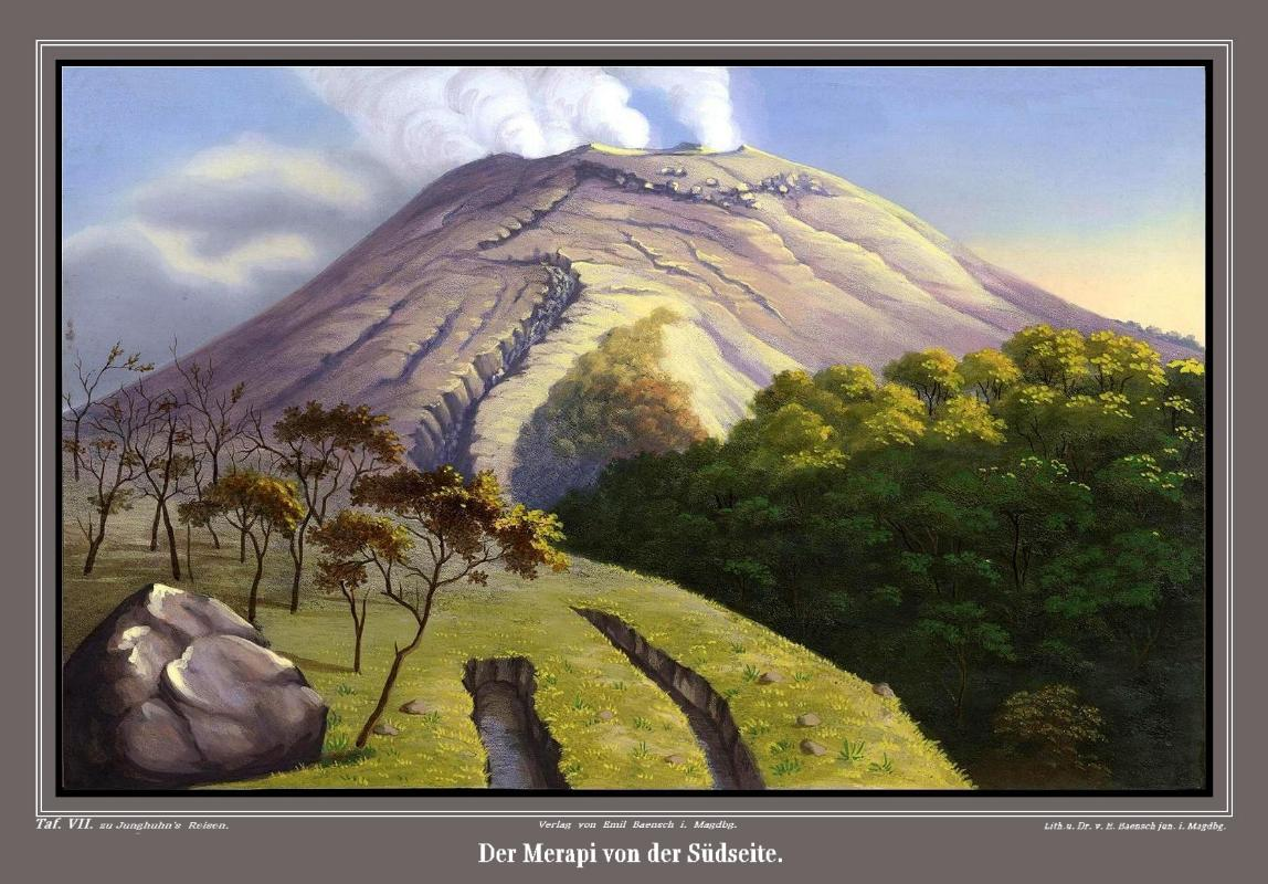 Merapi Südseite